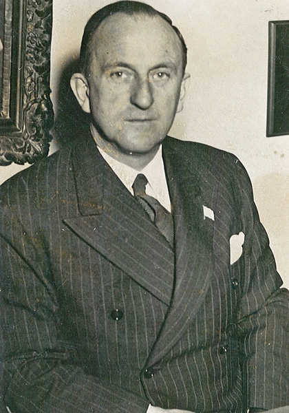 portrett, mann, agronom, generalsekretær, redaktør, brystbilde.